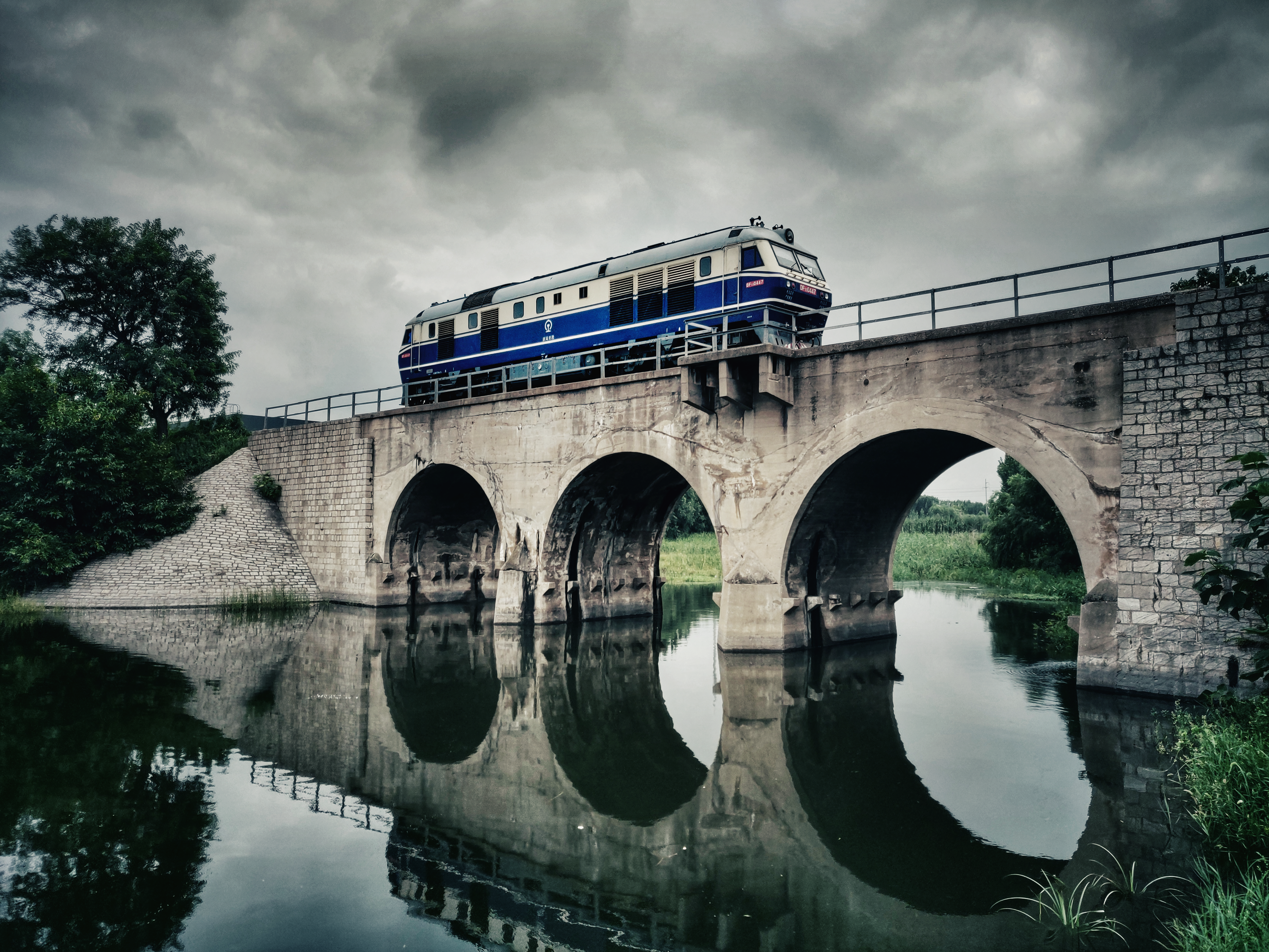 DF11 0447号单机通过桥14.032